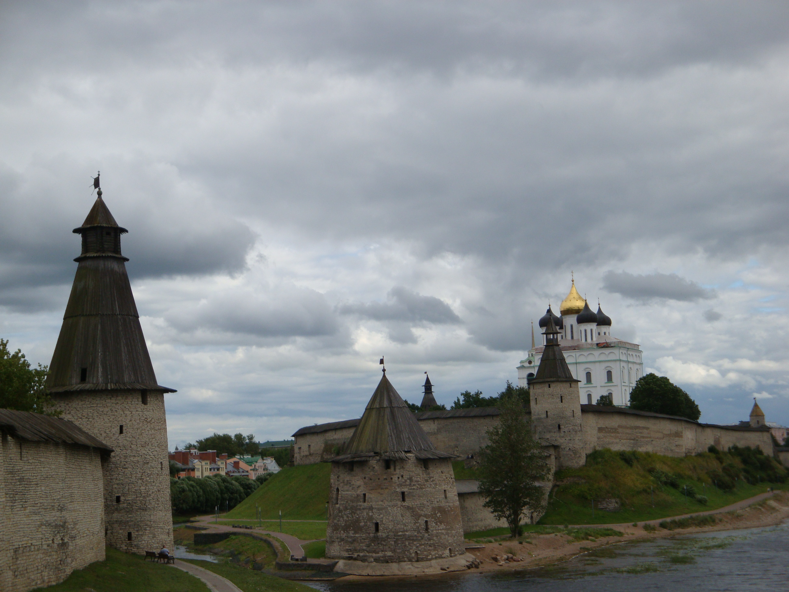 Kомплекс крепостных сооружений Окольного и Среднего города (Псковская область, Псков, улица р. Великой наб., Гремячая, Запсковье, Застенная улица, Красных партизан улица, Советская улица, территория электростанции)